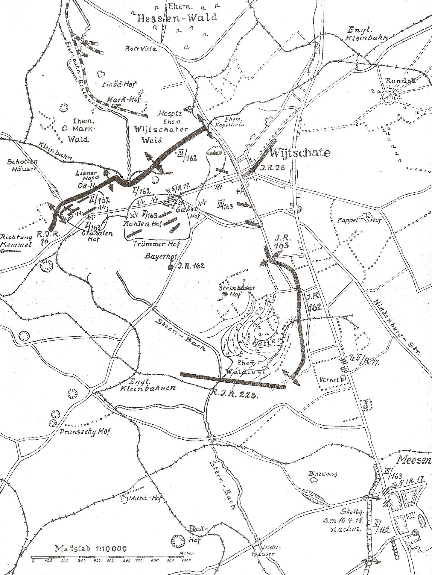 Rechtsschwenkung des I.R. 162 und Angriff auf Wytschaete